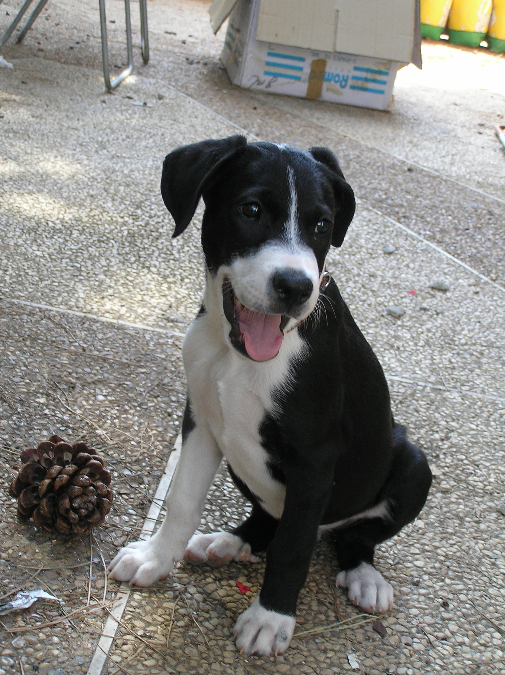 גור כלבים כבן חודשיים